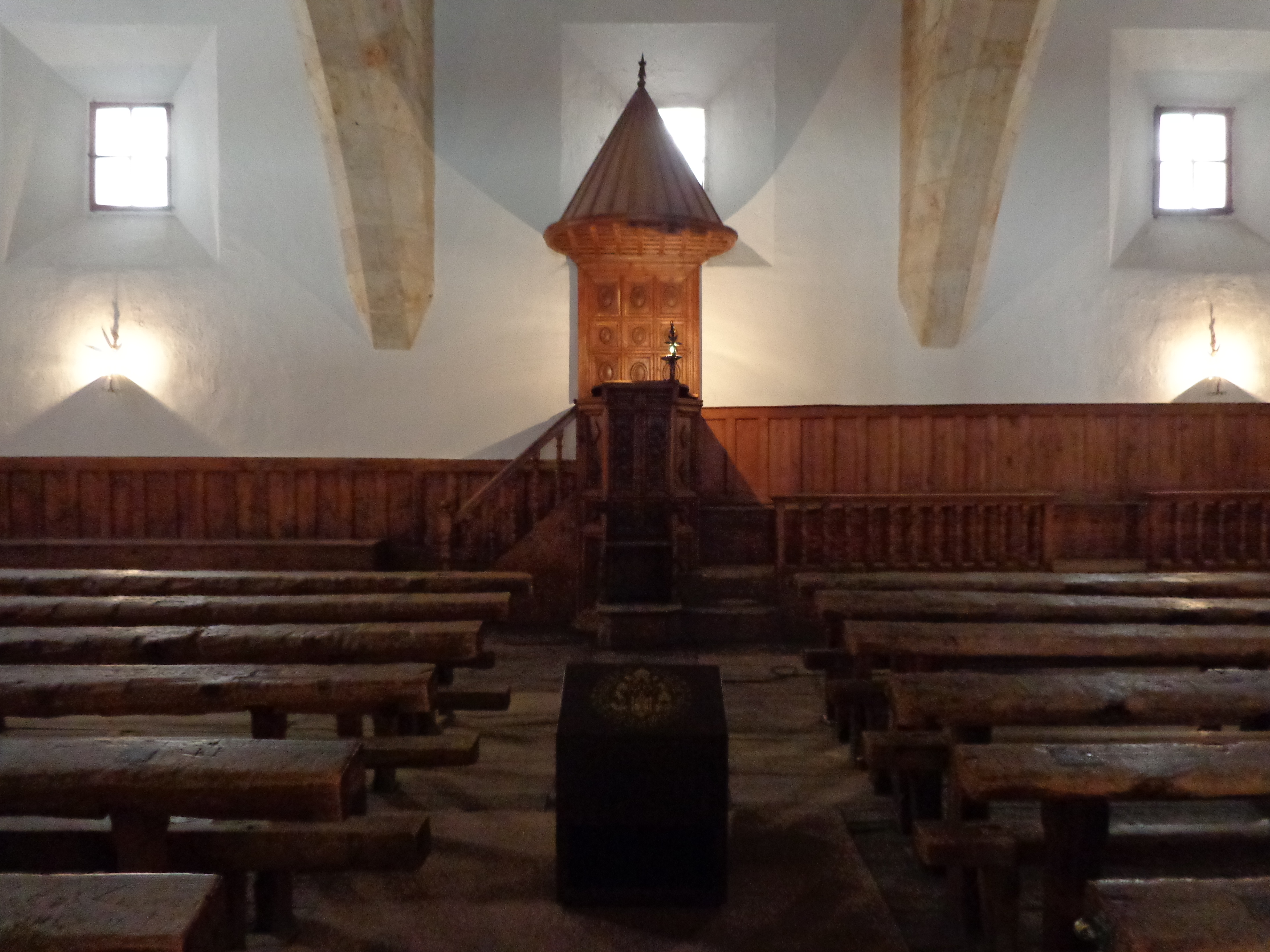 Escuelas Mayores, Universidad de Salamanca